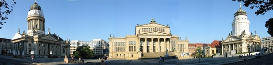 Gendarmenmarkt in Berlin (v2.0 perspective distortions removed.) Image:Gendarmenmarkt_in_Berlin-wiki-2.jpg